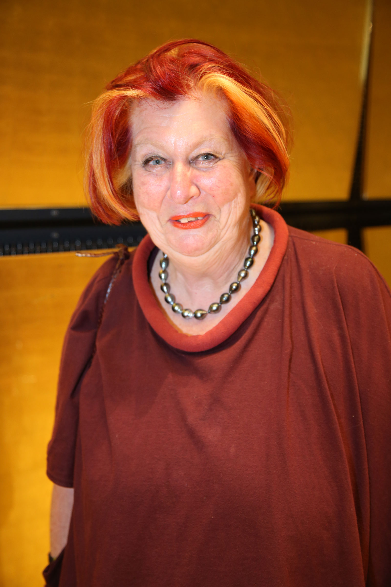 Verena Keller, Artists Management aus der Schweiz